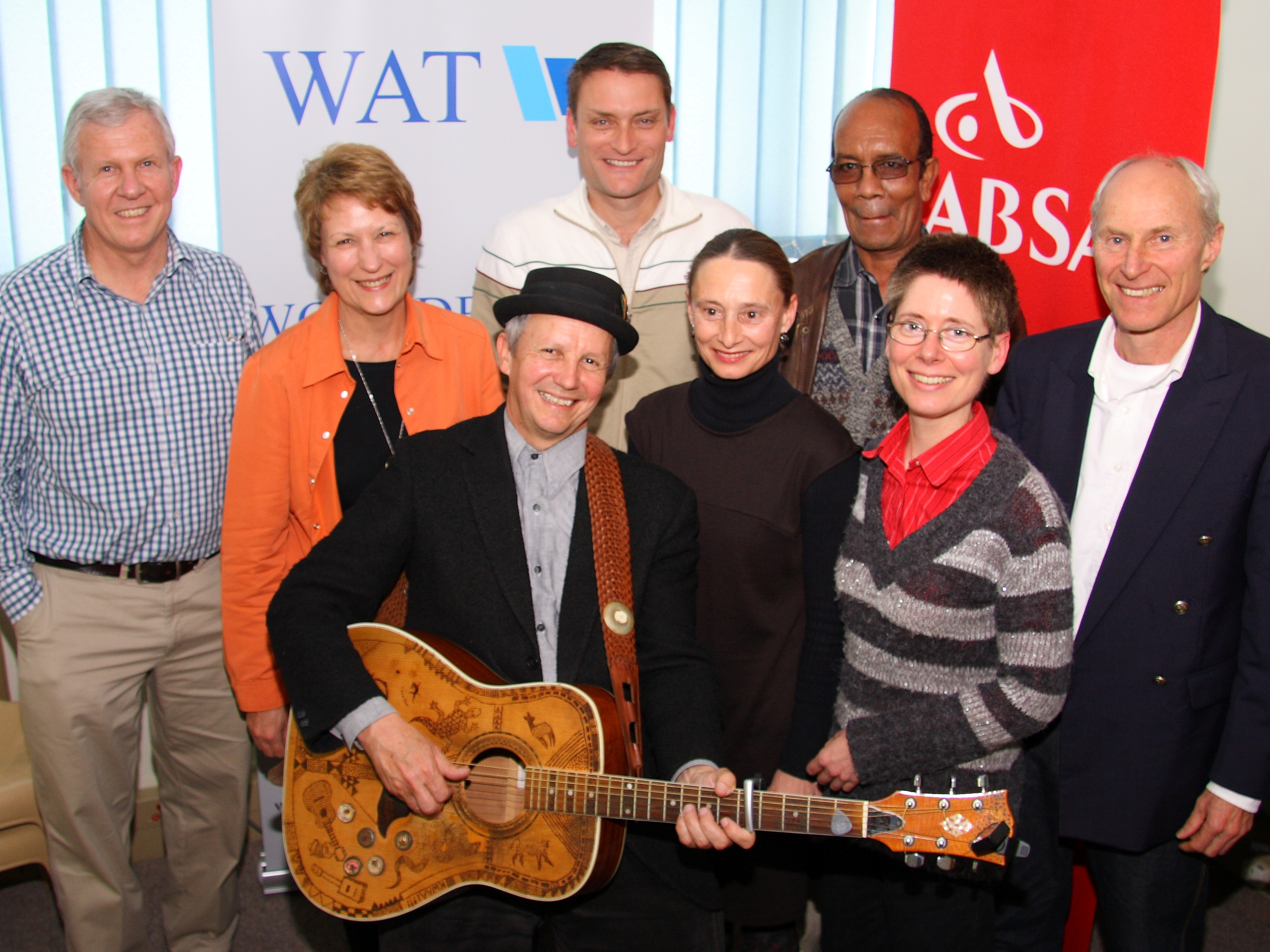 David Kramer